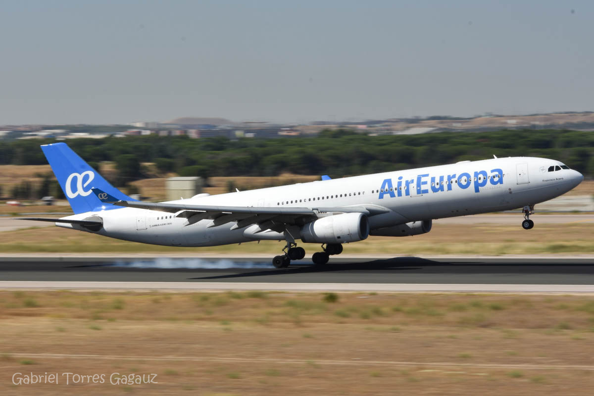 A330 de Air Europa aterrizando por la pista 32R de Madrid Barajas